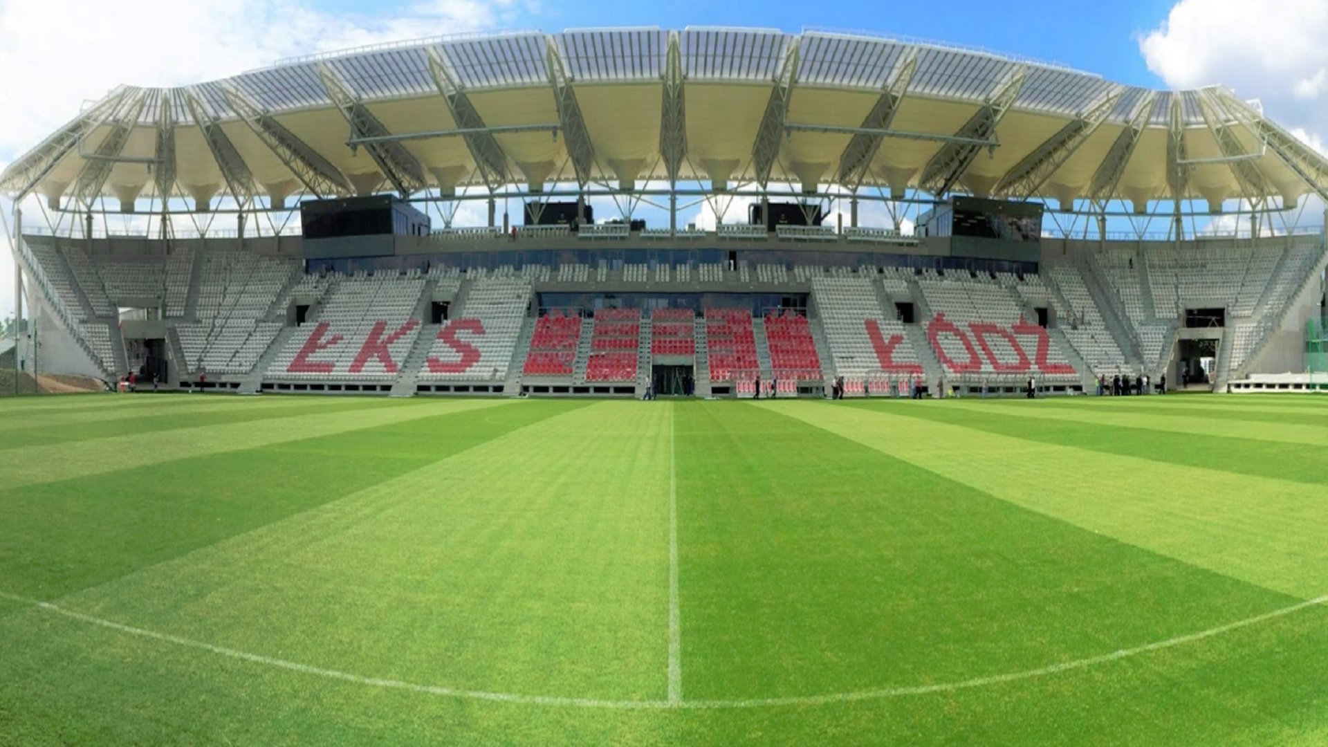 Stadion Miejski w Łodzi, na którym mecze ligowe i pucharowe rozgrywają piłkarze Łódzkiego Klubu Sportowego i rugbiści Budowlanych Łódź S.A.